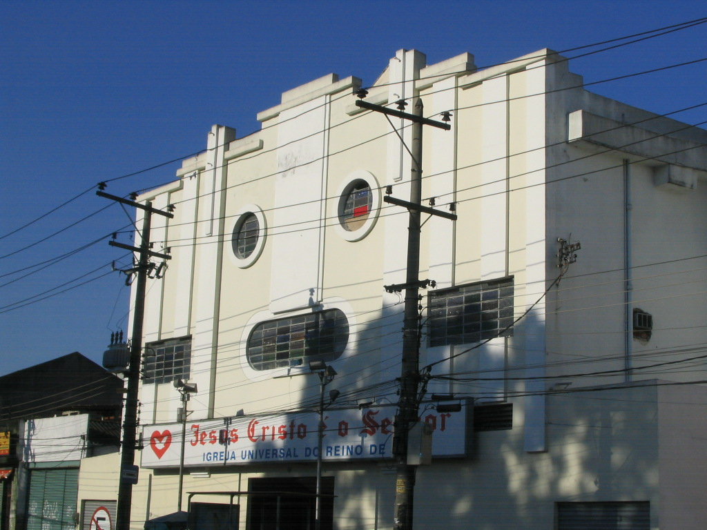 Predio do antigo Cine Irajá, onde atualmente se localiza a Igreja Universal do Reino de Deus. Photographer: Nelson Cravo Junior